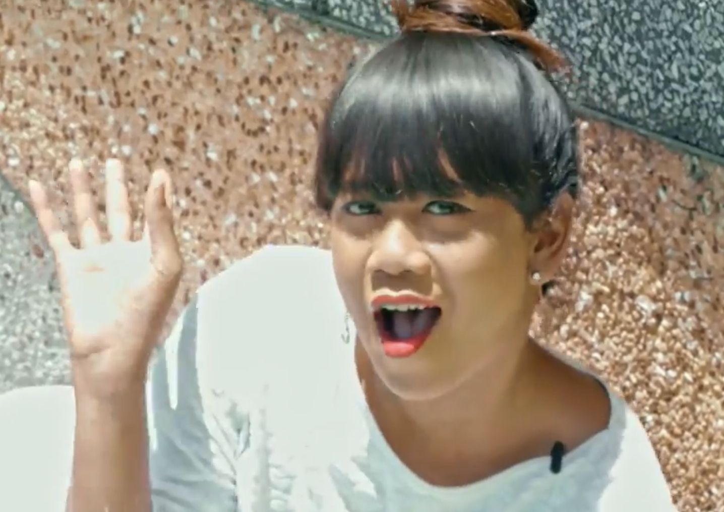 เจนนี่ ปาหนัน